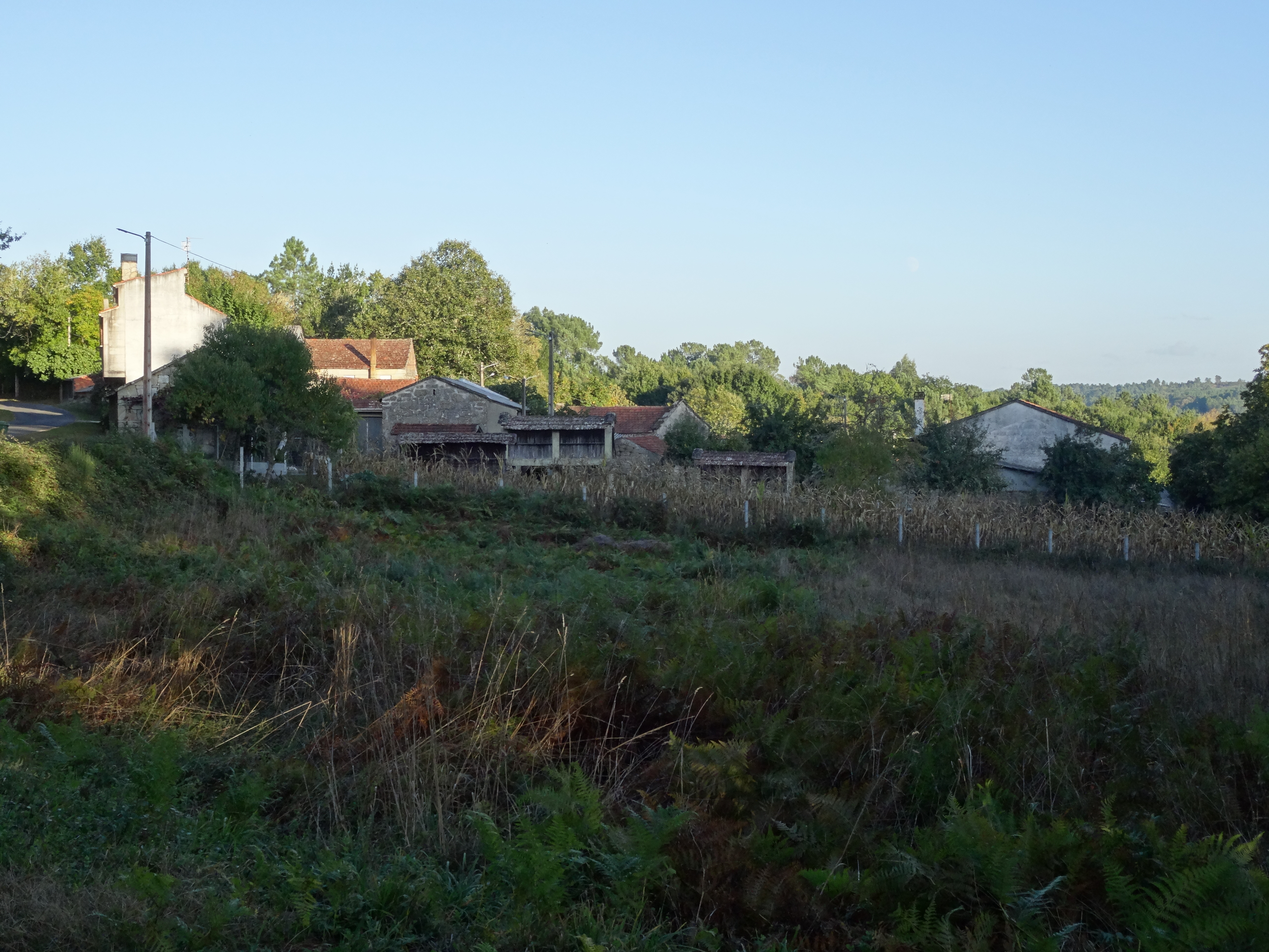 Ver título.